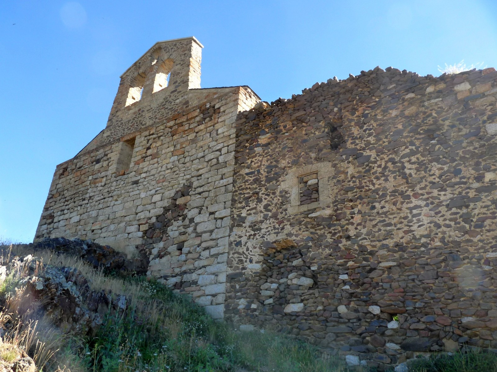 Façade ouest, Chapelle du Belloc, Dorres, Pyrénées-Orientales, France